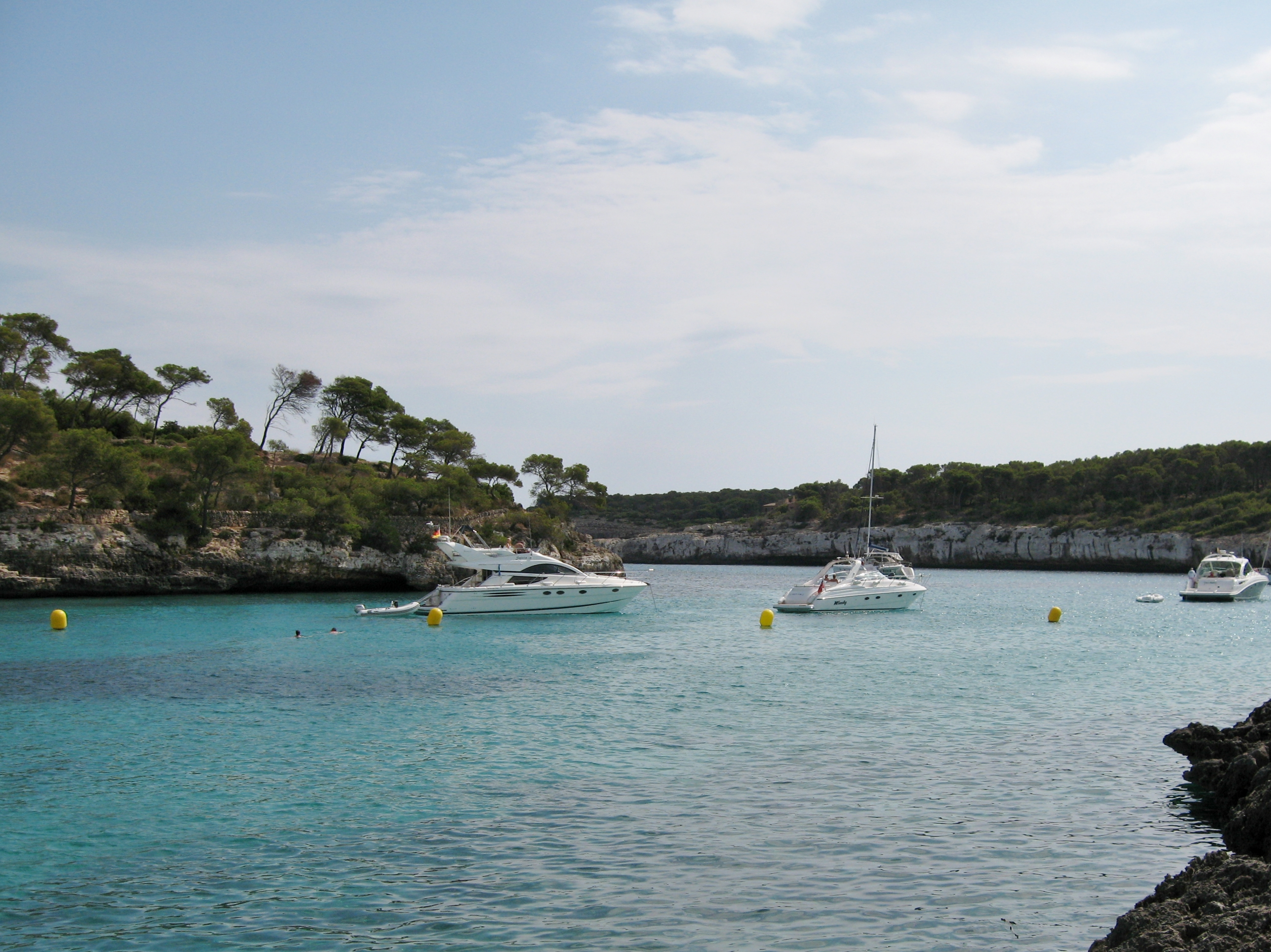 Cala Mondragó, Gemeinde Santanyí, Mallorca, Spanien